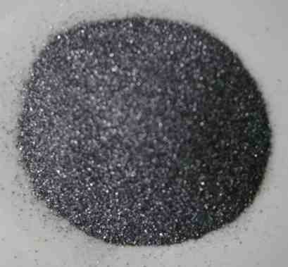 Siliziumpulver